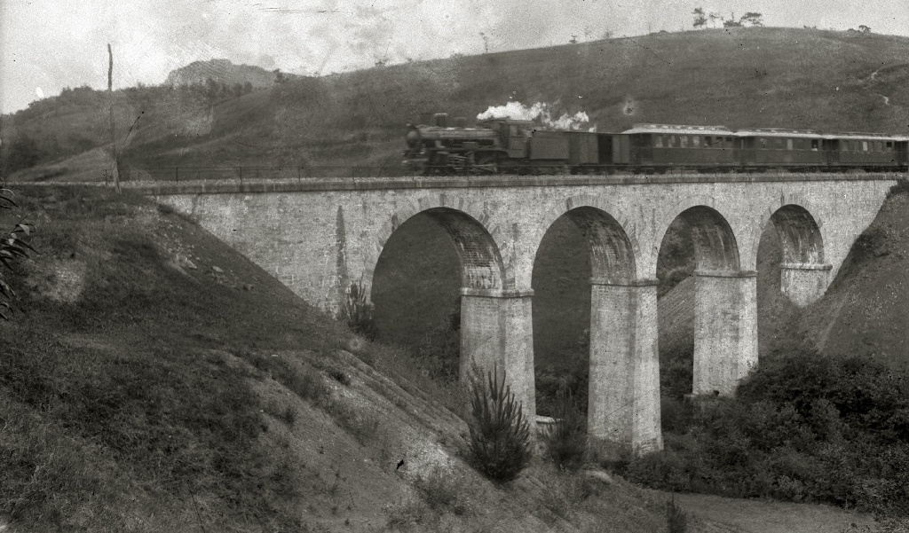 Plazaolako trena, Lasarte ekialdeko zubia gurutzatzen.